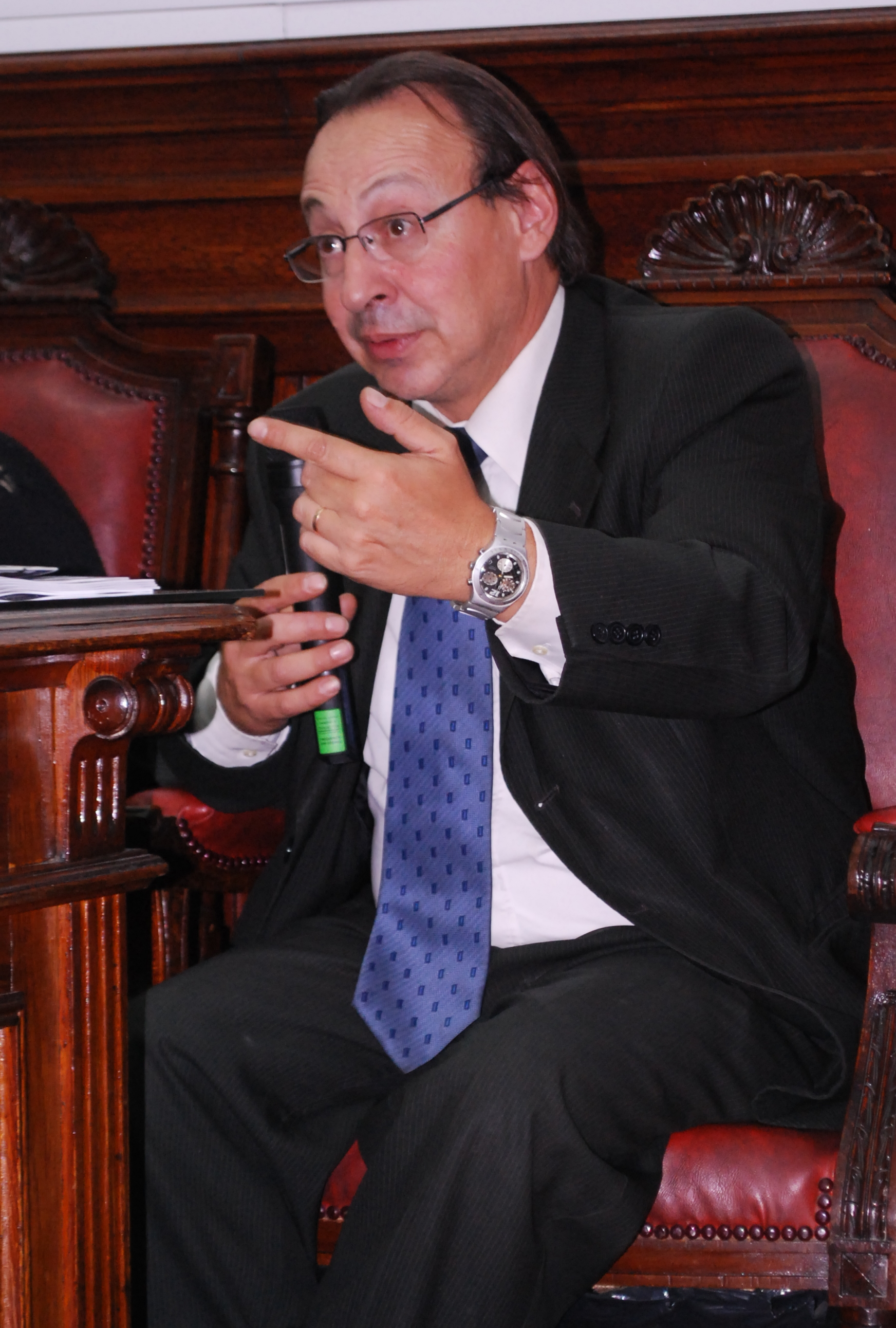 El Doctor en Derecho y Ciencias Sociales Oscar López Goldaracena, dando una charla en el marco de la campaña por la anulación de la "Ley de Caducidad", en la Facultad de Derecho de la Universidad de la República (Uruguay).